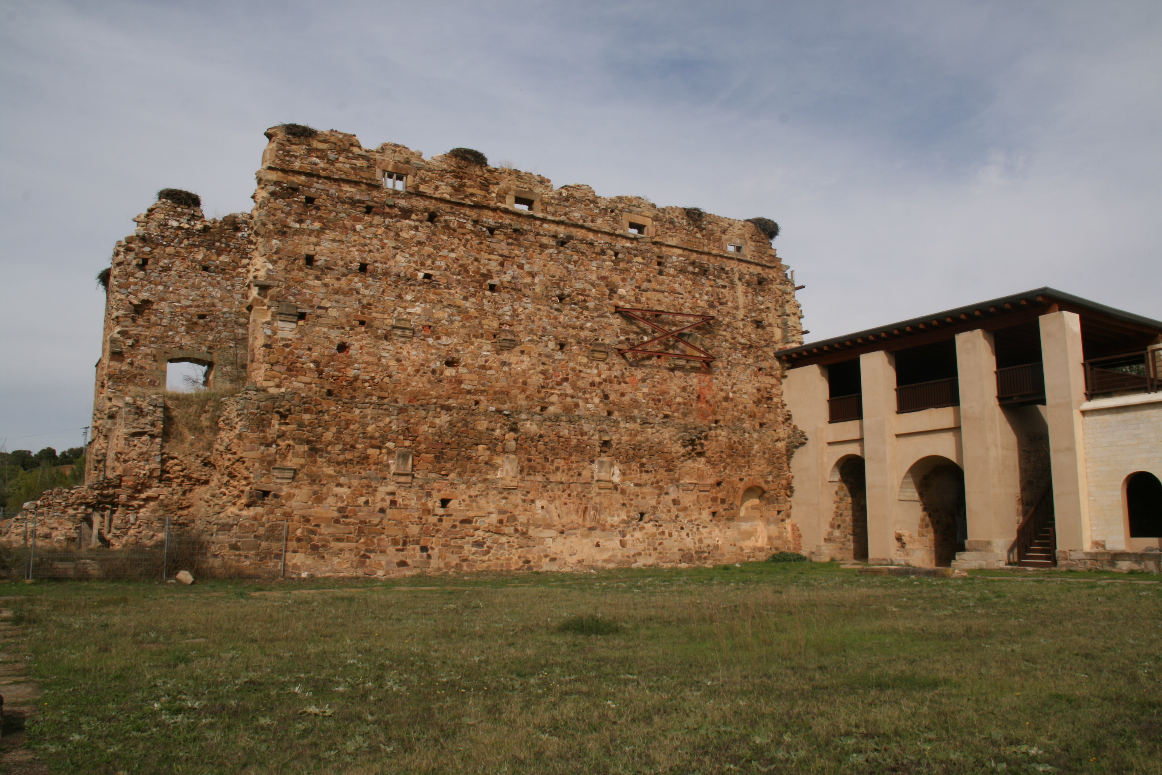 Panda Norte con el calefactorio, cocina y refectorio de Santa María de Moreruela, Zamora